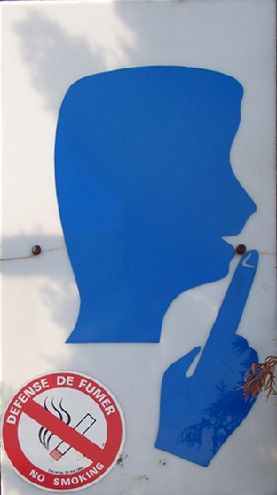 "don't smoke - don't talk", Lourdes, France